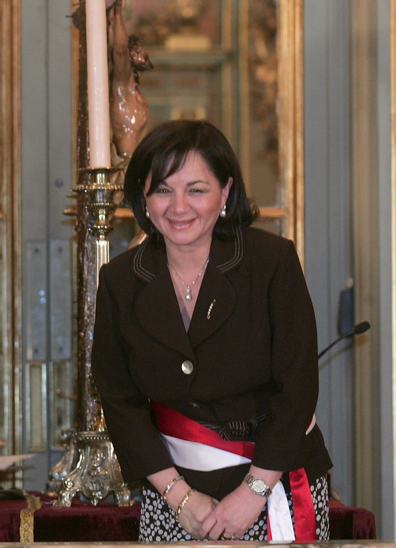 Juramentaci ón de la ministra de Justicia, Rosario Fernández, en su segundo debut en el gabinete que preside Yehude Simon.